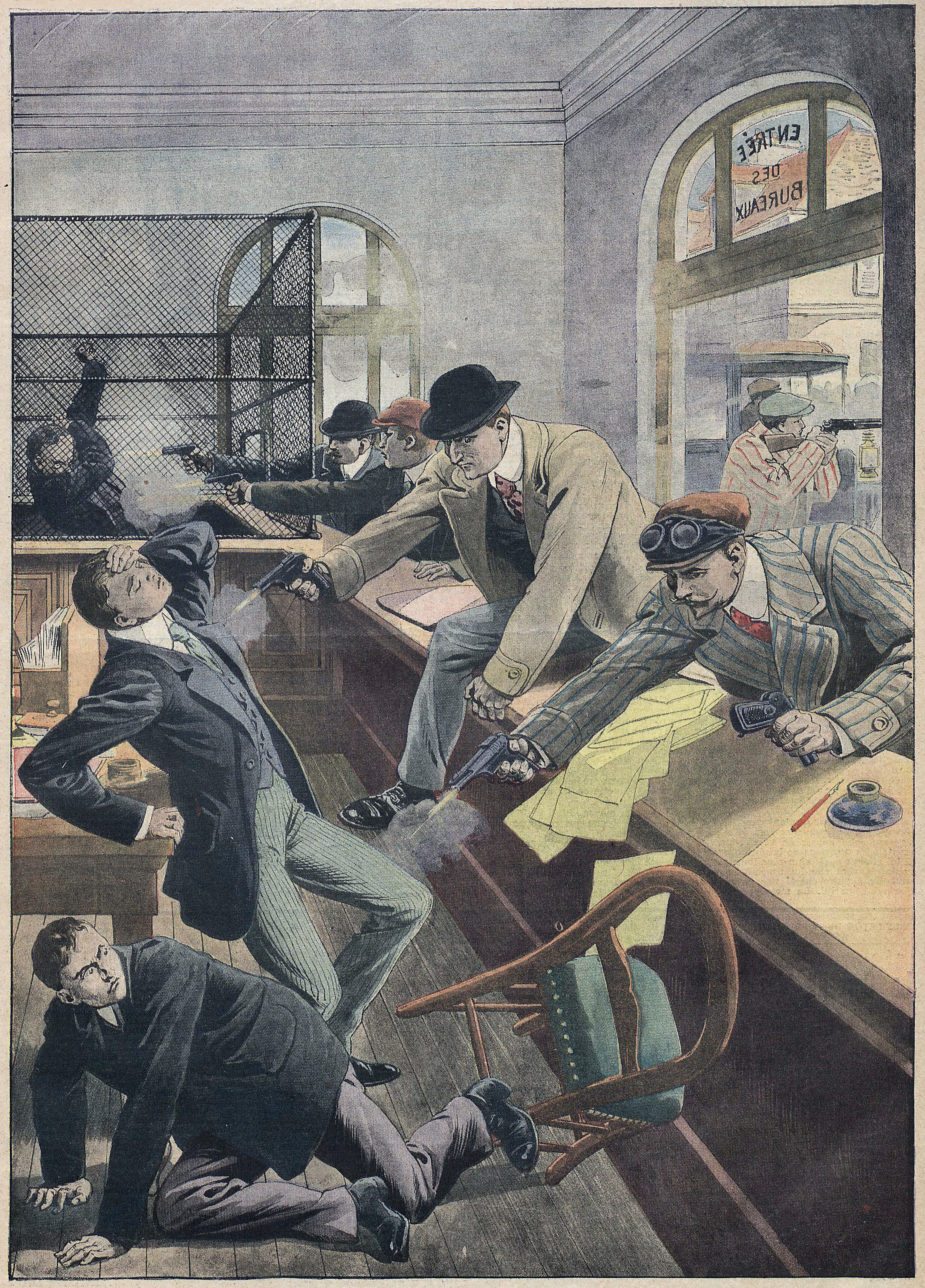 Attaque de l'agence de la Société Générale à Chantilly par la bande à Bonnot (anarcho-illégaliste), illustrée dans le supplément du Petit Journal.